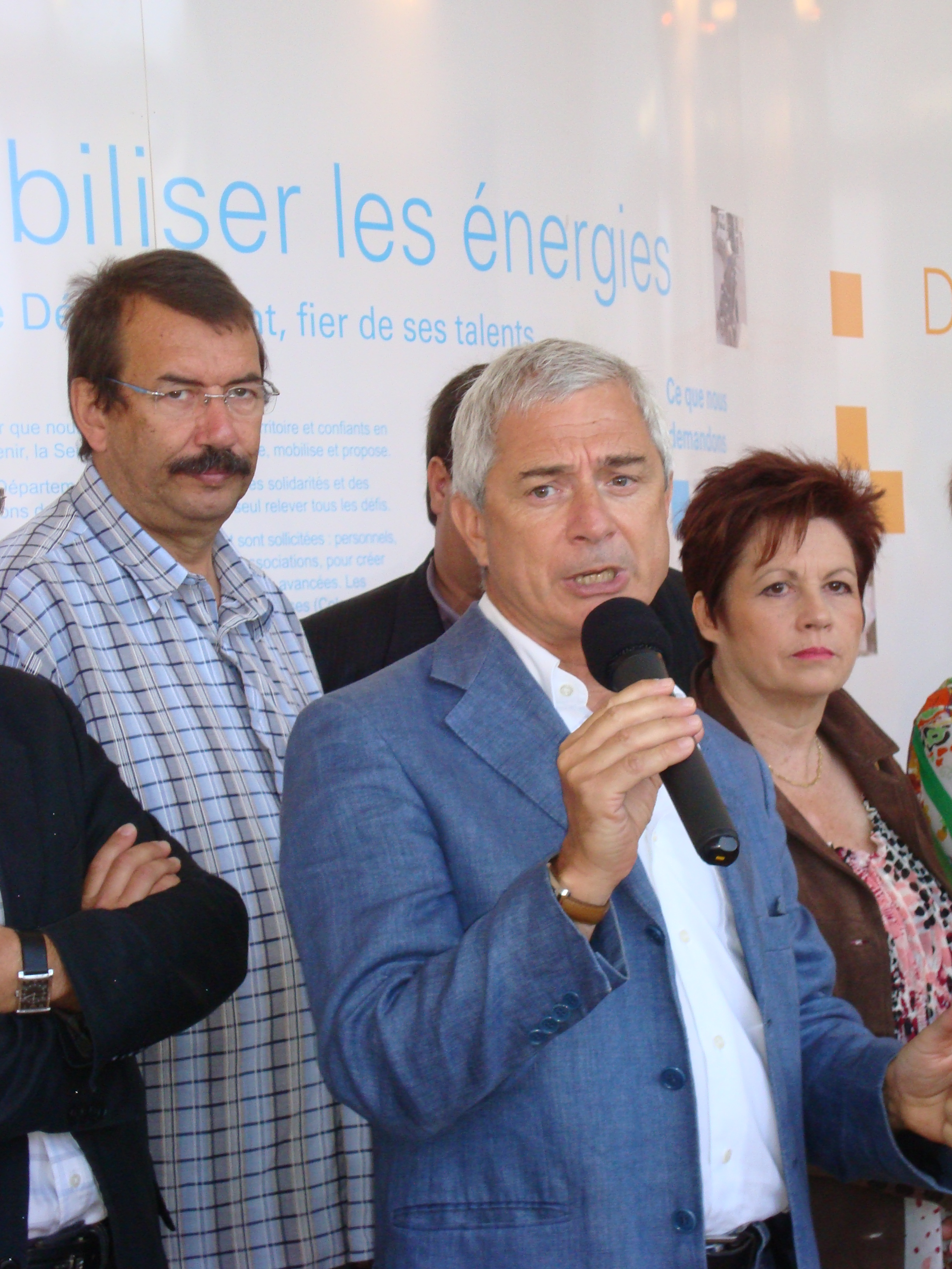 Claude Bartolone, Gilbert Roger et Michèle Bailly au stand du Conseil général de la Seine-Saint-Denis lors de la Fête de l'Humanité 2009